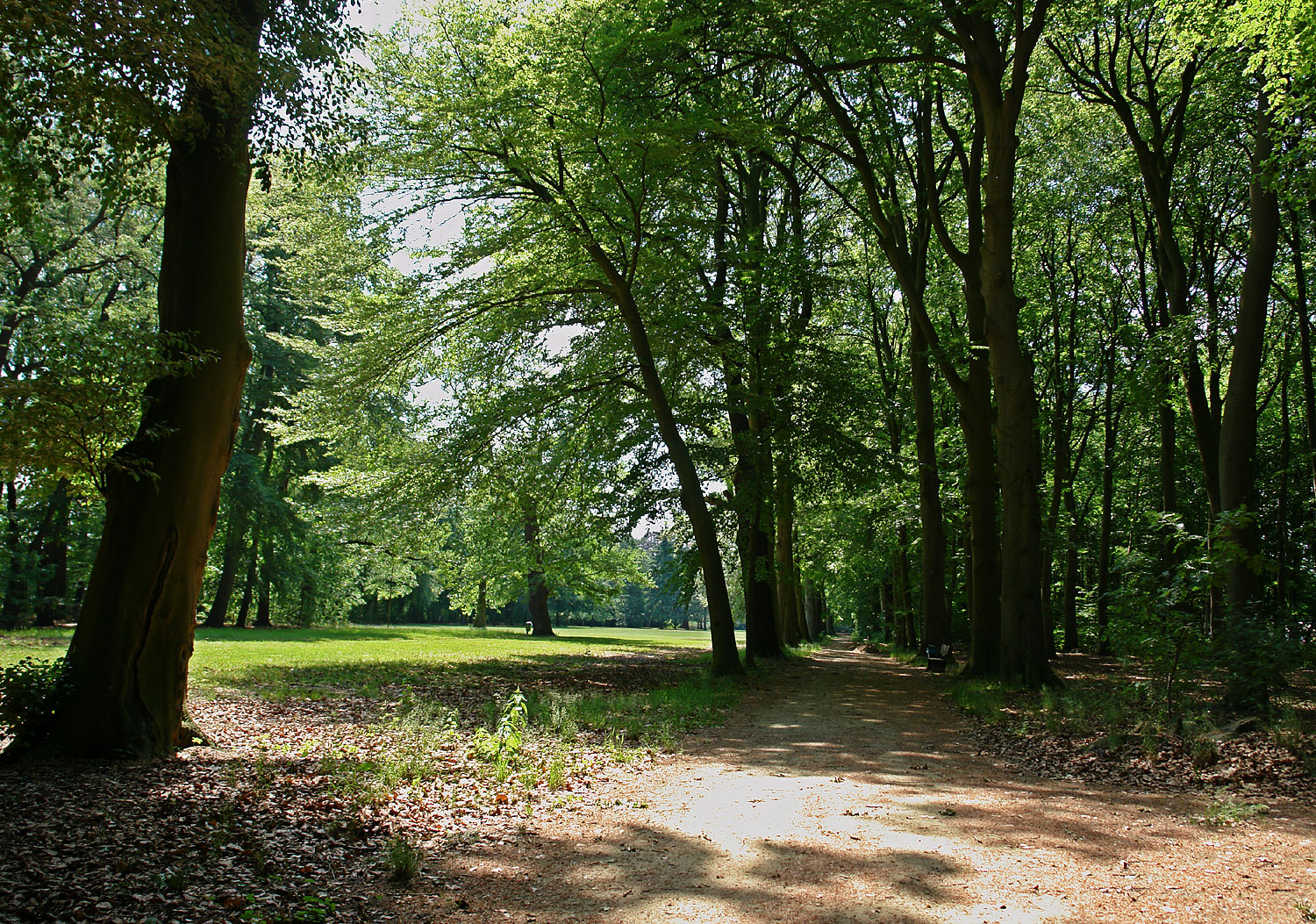 Egestorff-Stiftung in Bremen: Parkweg Richtung Herrenhaus Das abgebildete Objekt ist ein geschütztes Kulturdenkmal in der Freien Hansestadt Bremen, mit der Nr. 0970,T001 beim Landesamt für Denkmalpflege registriert.